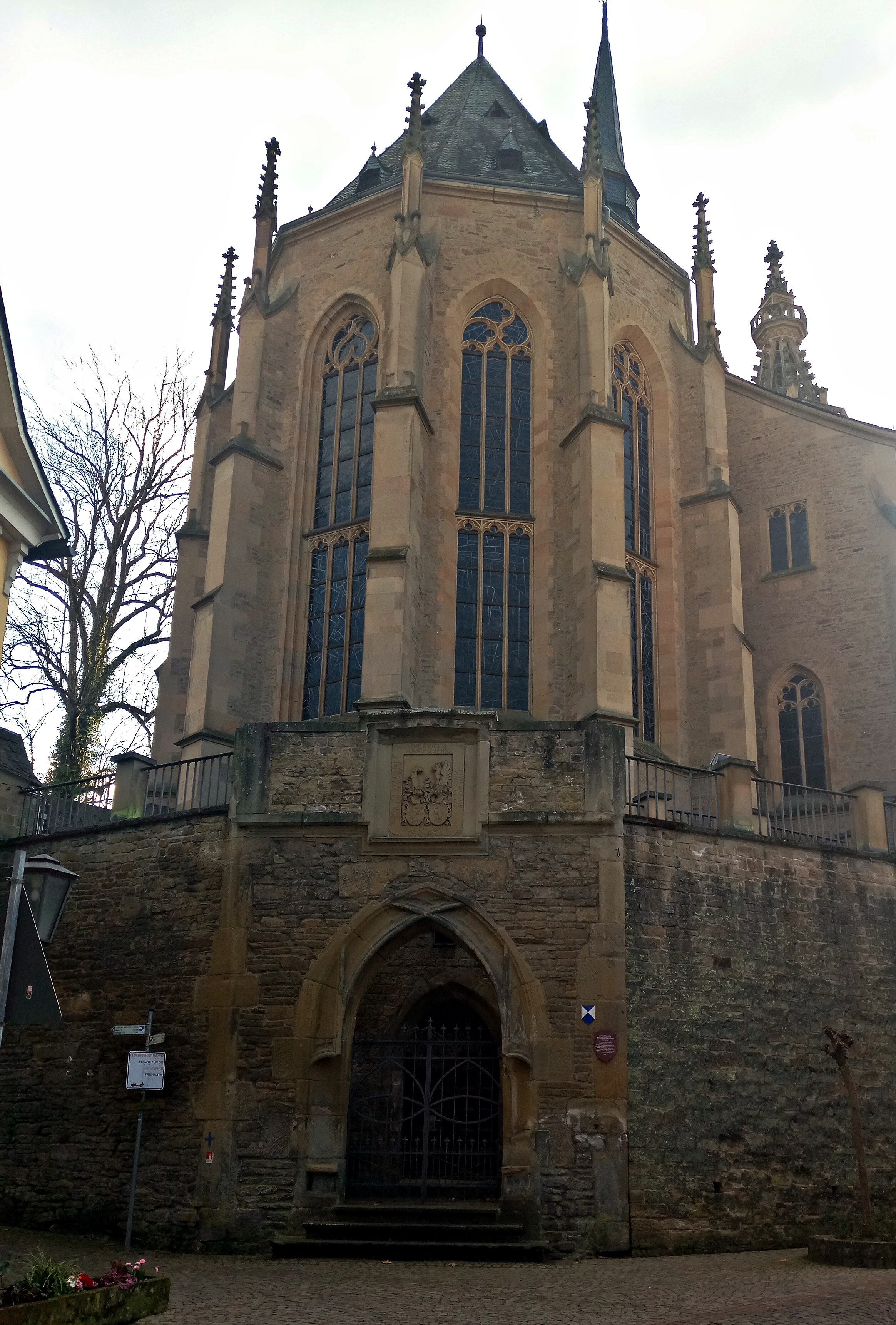 Schlosskirche Meisenheim von Osten mit Portal